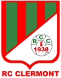 Logo RC Clermont en 120 de large